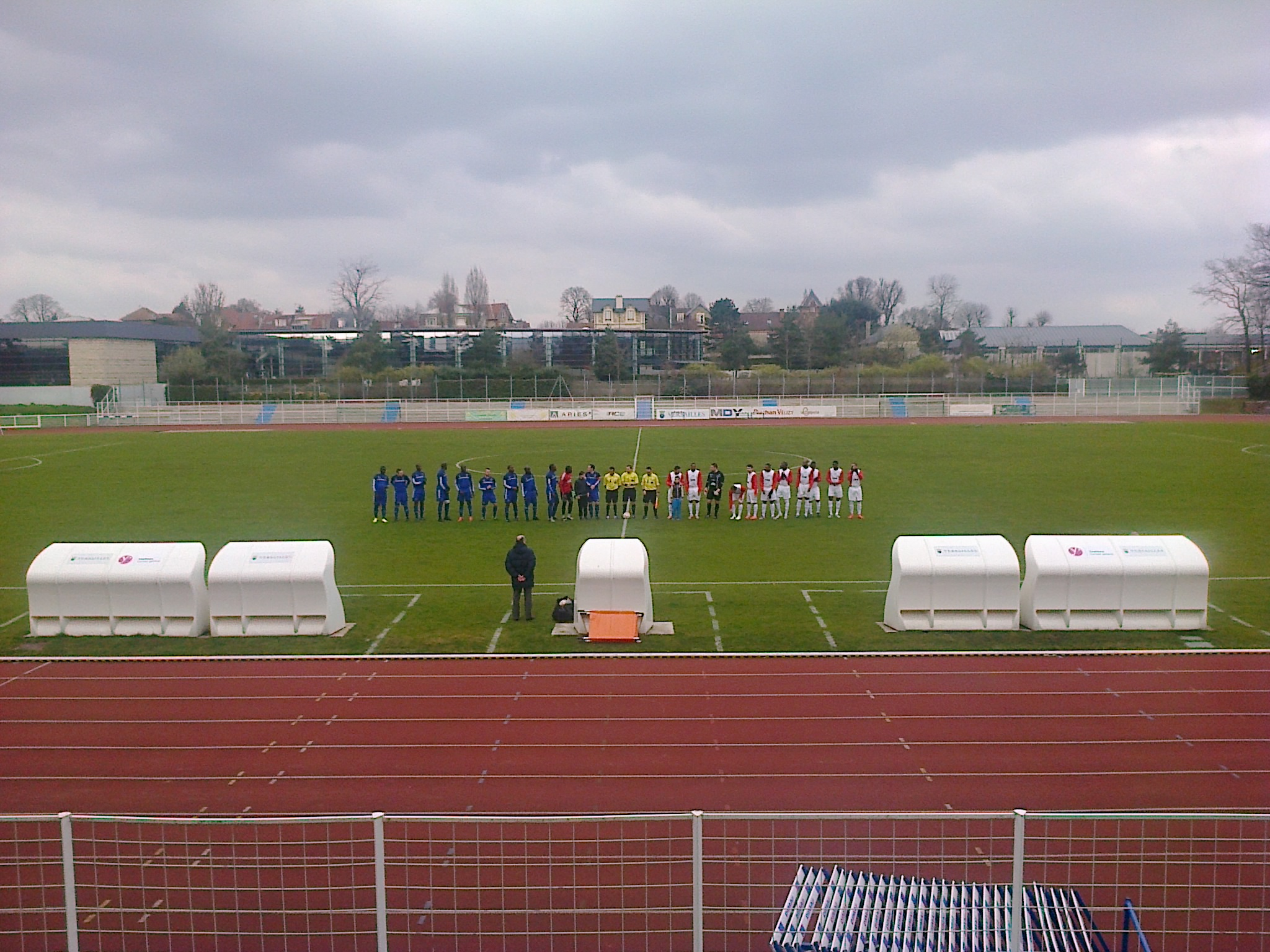 Présentation des équipes avant le match FC Versailles - US Créteil (DH, 1-1) le 22 mars 2015 au stade Montbauron